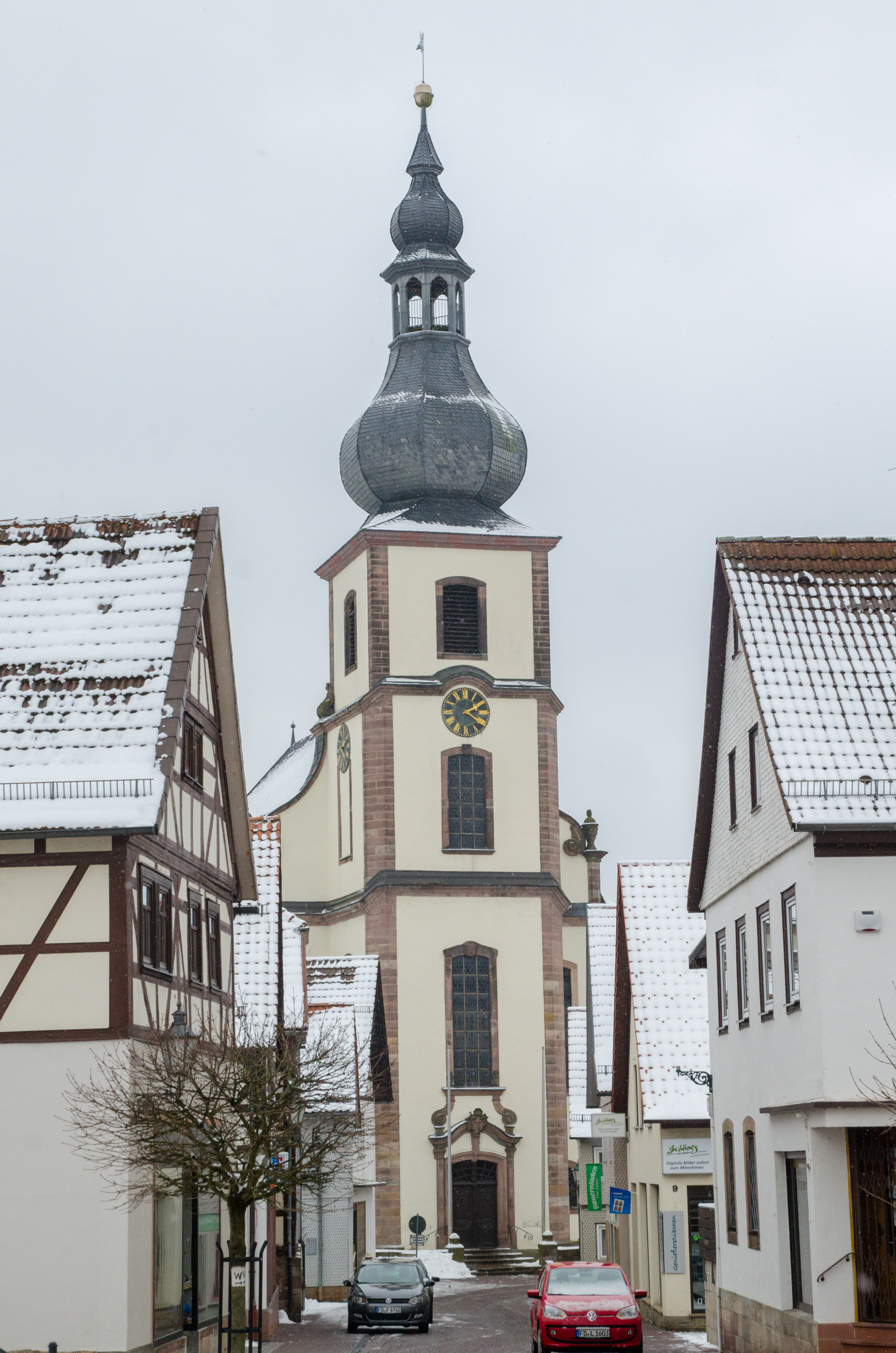 Evangelische Barockkirche in Gersfeld (Rhön)